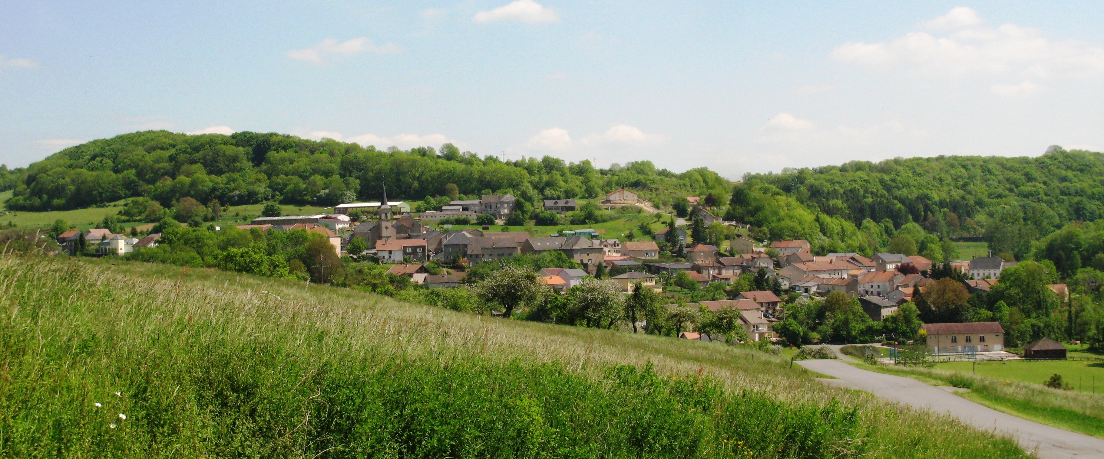 Manderen von der Burg Marlbrouck aus gesehen